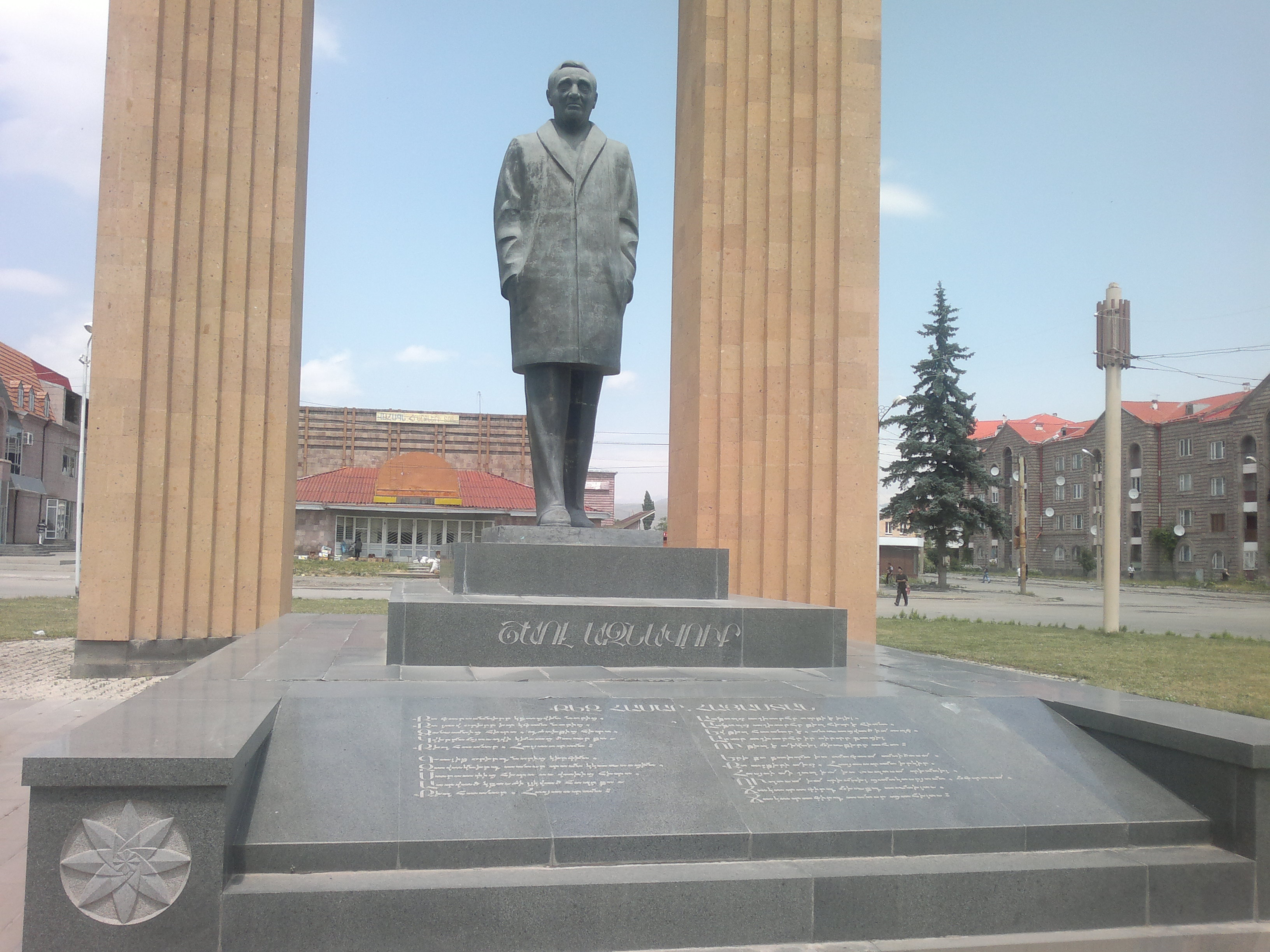 Շառլ Ազնավուրի հուշարձանը Գյումրիում 1/4.875